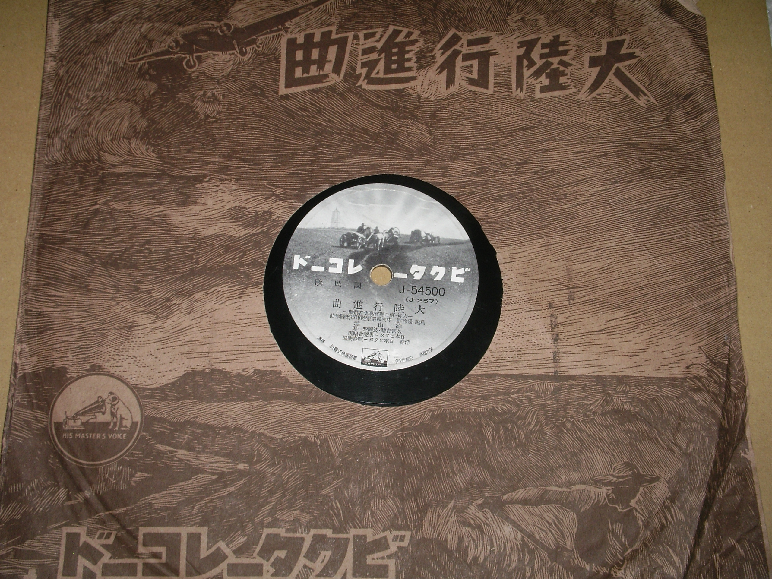 1938年ビクターレコードから発売された大陸行進曲を撮影。